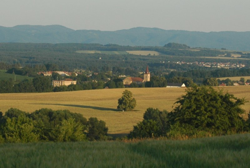 Štefanov